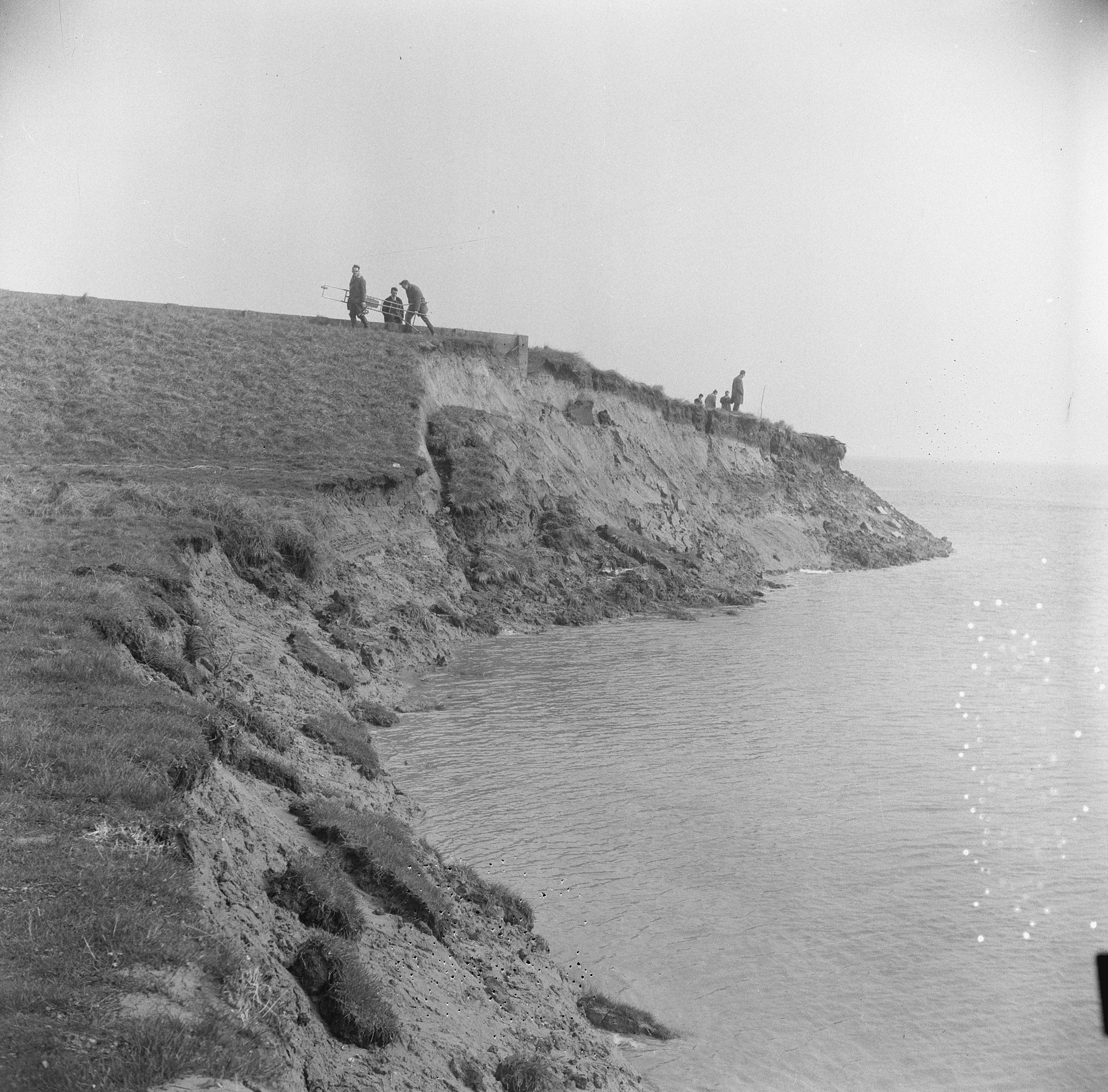 Collectie / Archief : Fotocollectie Anefo Reportage / Serie : [ onbekend ] Beschrijving : Dijkval in Zeeland, bij Kats op Noord-Beveland Datum : 22 maart 1966 Locatie : Kats, Noord-Beveland, Zeeland Fotograaf : Slagboom, […] / Anefo Auteursrechthebbende : Nationaal Archief Materiaalsoort : Negatief (zwart/wit) Nummer archiefinventaris : bekijk toegang 2.24.01.03 Bestanddeelnummer : 918-9476